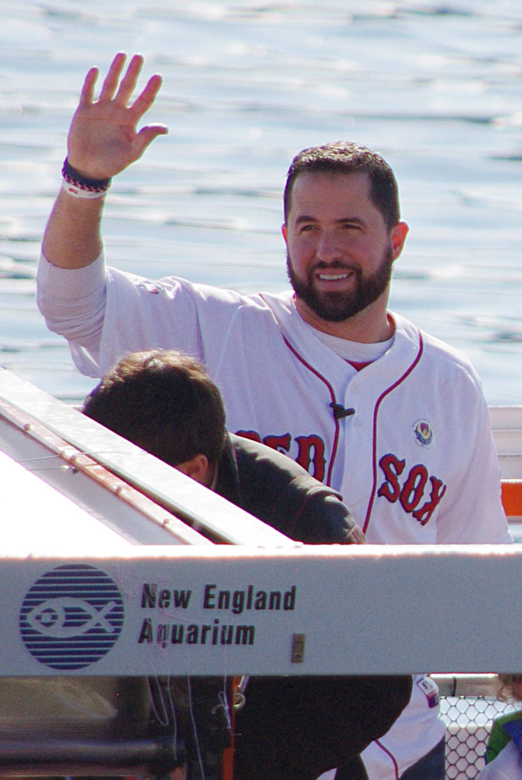 John McDonald